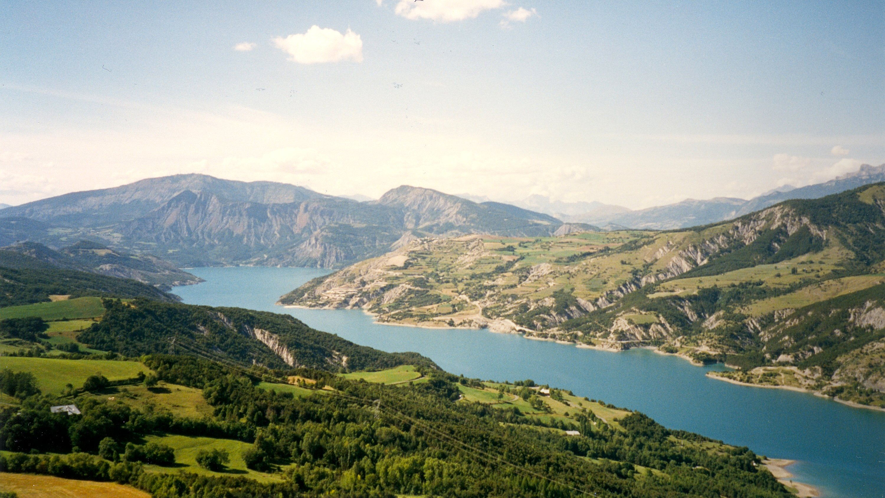 Lac de Serre-Poncon